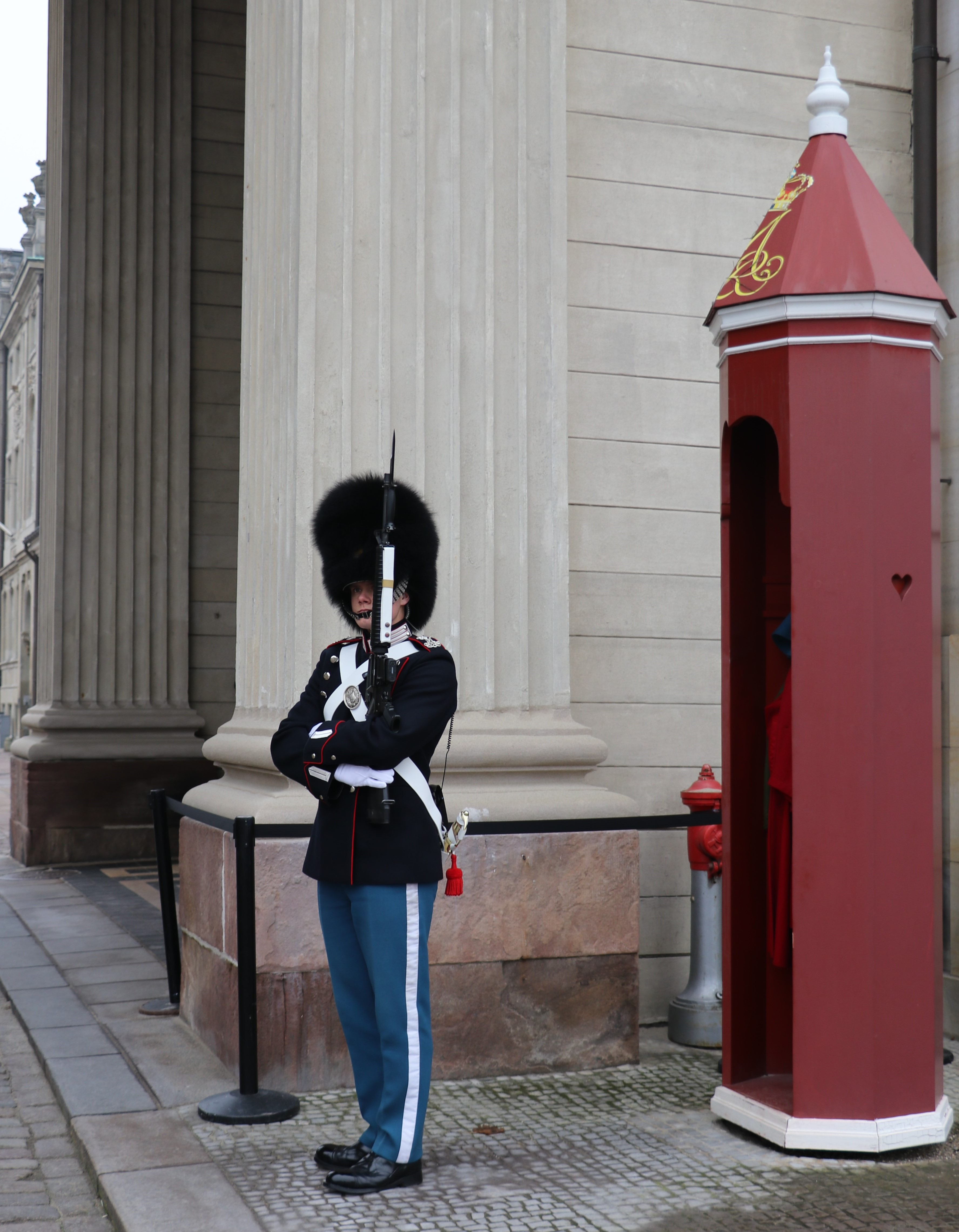 Á myndinni sést yfirvörður.Yfirverðir stýra og hafa umsjón með vörðum afleysinga sinna meðan á vaktinni stendur.